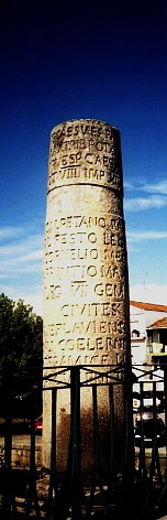 Copia del cadrao dos povos, inscripción honoraria romana colocada en el Puente Trajano en Chaves (Portugal) correspondiente con CIL II 2477 = CIL II 5616 = EE VIII, 406 = AE 1952, 122 = AE 1983, 586 = AE 1994, 939: Imp(eratori) Caes(ari) Ve[sp(asiano) Aug(usto) pont(ifici)]/ max(imo) trib(unicia) pot(estate) [X imp(eratori) XX p(atri) p(atriae) co(n)s(uli) IX]/ Imp(eratori) Vesp(asiano) Caes(ari) Au[g(usti) f(ilio) pont(ifici) trib(unicia) pot(estate)]/ VIII imp(eratori) XIIII co(n)[s(uli) VII(?)]/ ------/ G(aio!) Calpetano Ra[ntio Quirinali]/ Val(erio) Festo leg(ato) A[ug(usti) pr(o) pr(aetore)]/ D(ecimo) Cornelio Ma[eciano leg(ato) Aug(usti)]/ L(ucio) Arruntio Max[imo proc(uratori) Aug(usti)]/ leg(ionis) VII Gem(inae) [Fel(icis)]/ civitates [X] / Aquiflavien[ses -----]/ Bibali Coel[erni ----]/ Interamic[i ----]/ Quarque[r]ni Ta[magani]